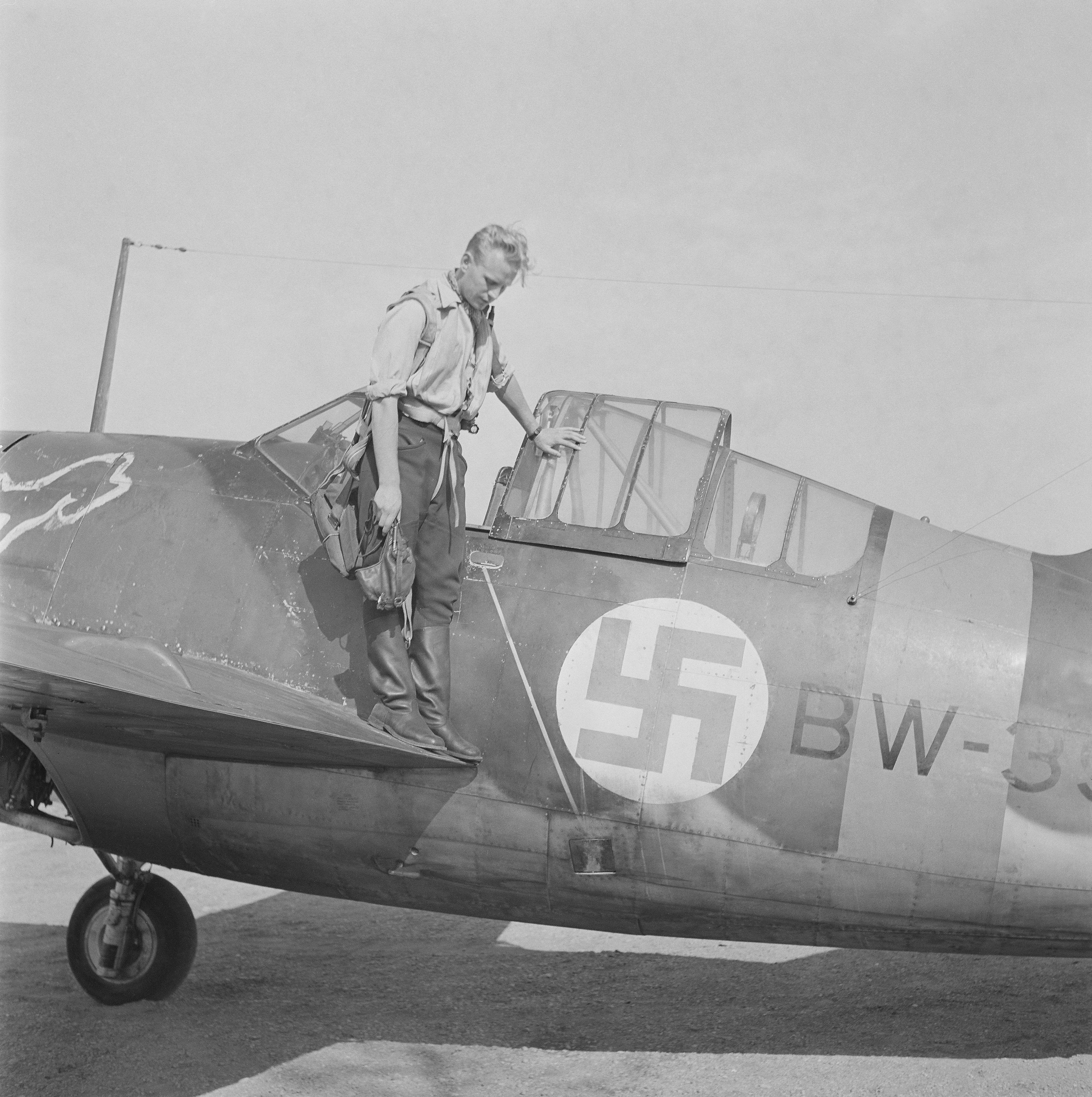 Luutanantti Wind ajokkeineen. (Lentokone on Brewster B.239). Kuvauspaikka: Suulajärvi